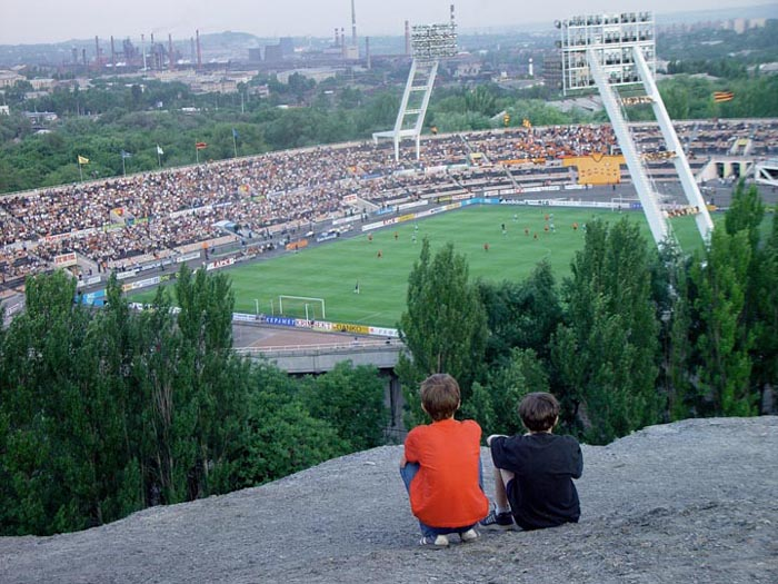 Стадион Шахтер с знаменитого террикона